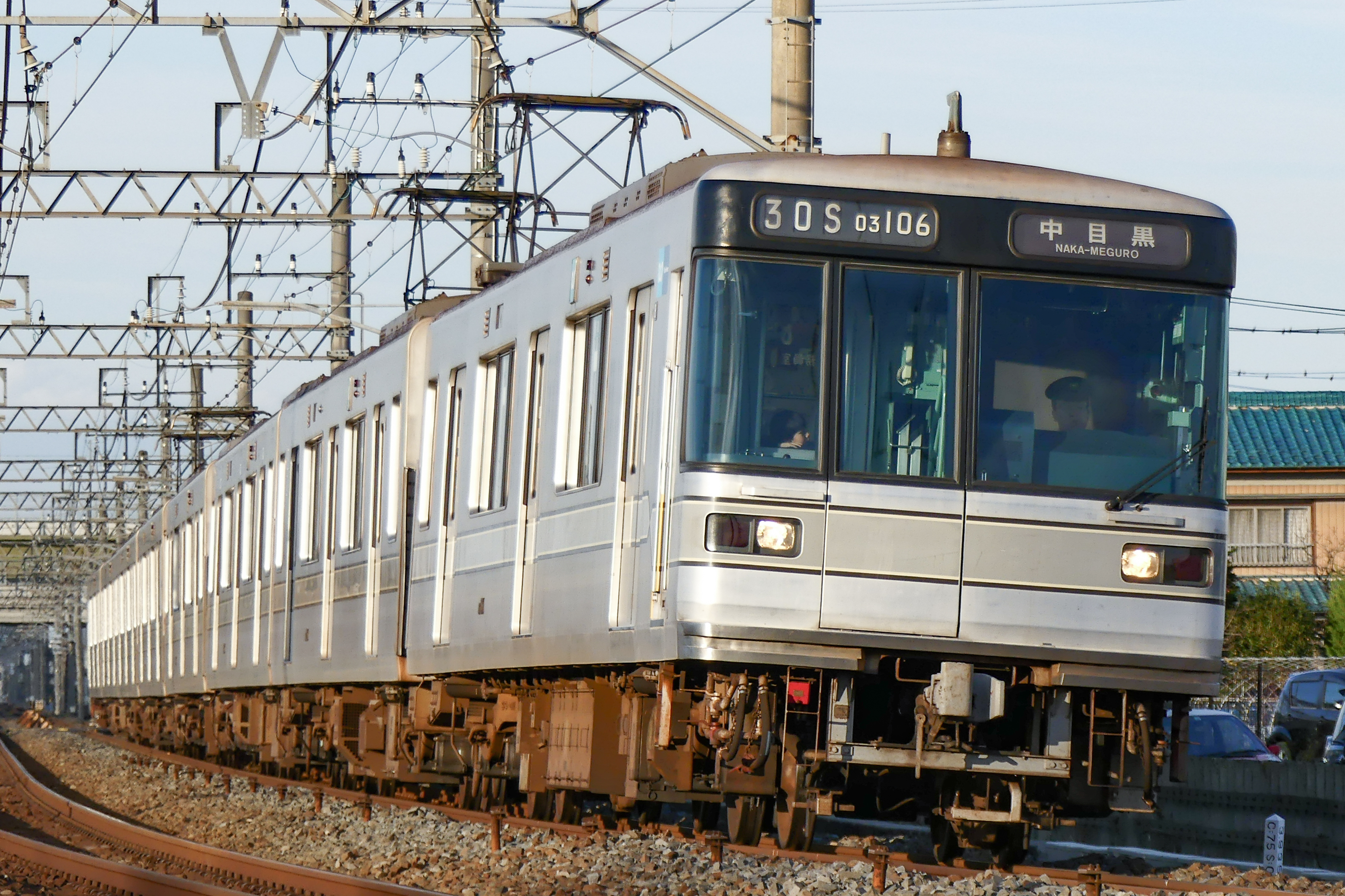 東京メトロ日比谷線03系106編成